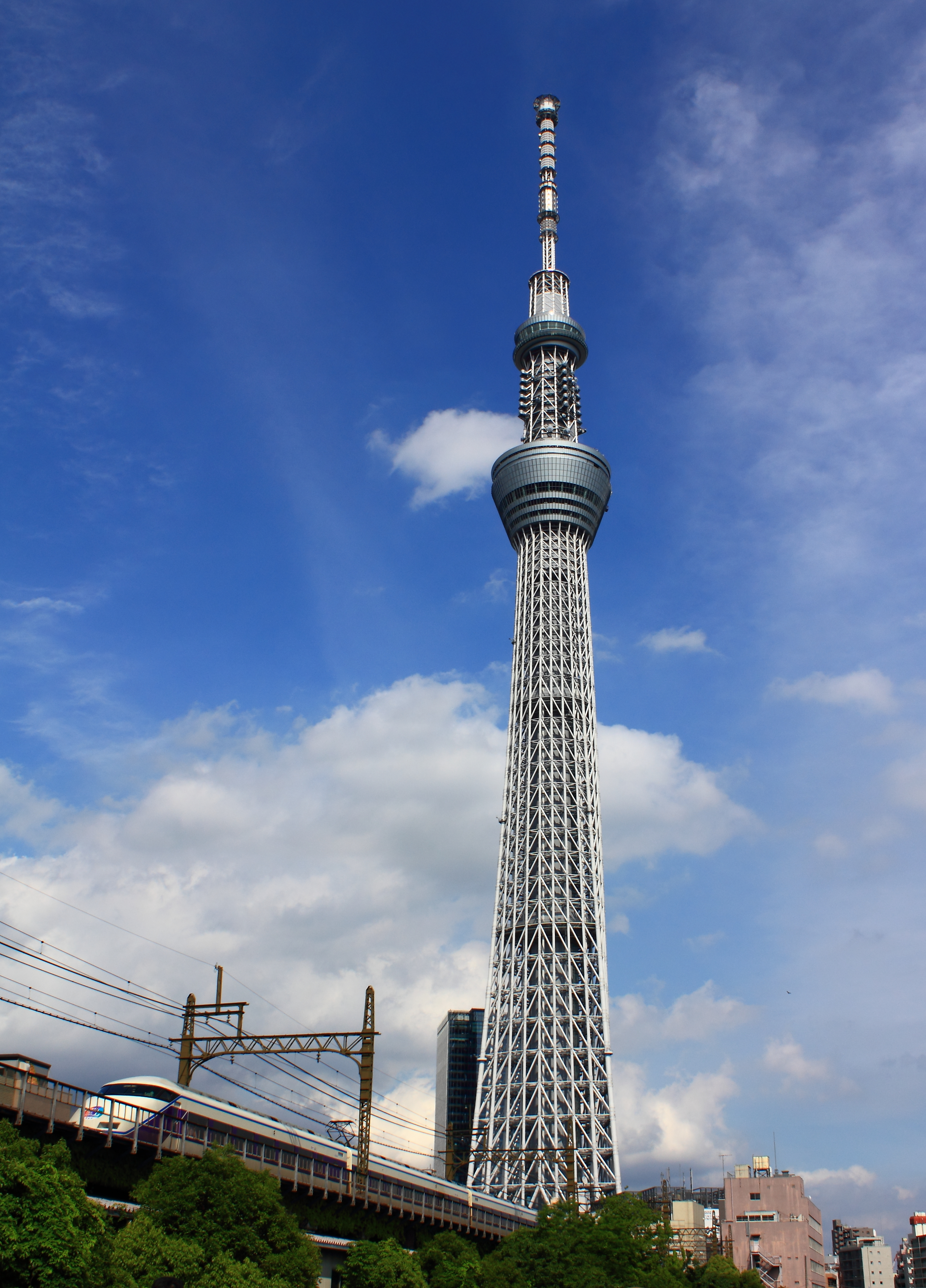 東京スカイツリー（東京都墨田区）と東武伊勢崎線スペーシア（ファイル名間違え）。北十間川の源森橋より。